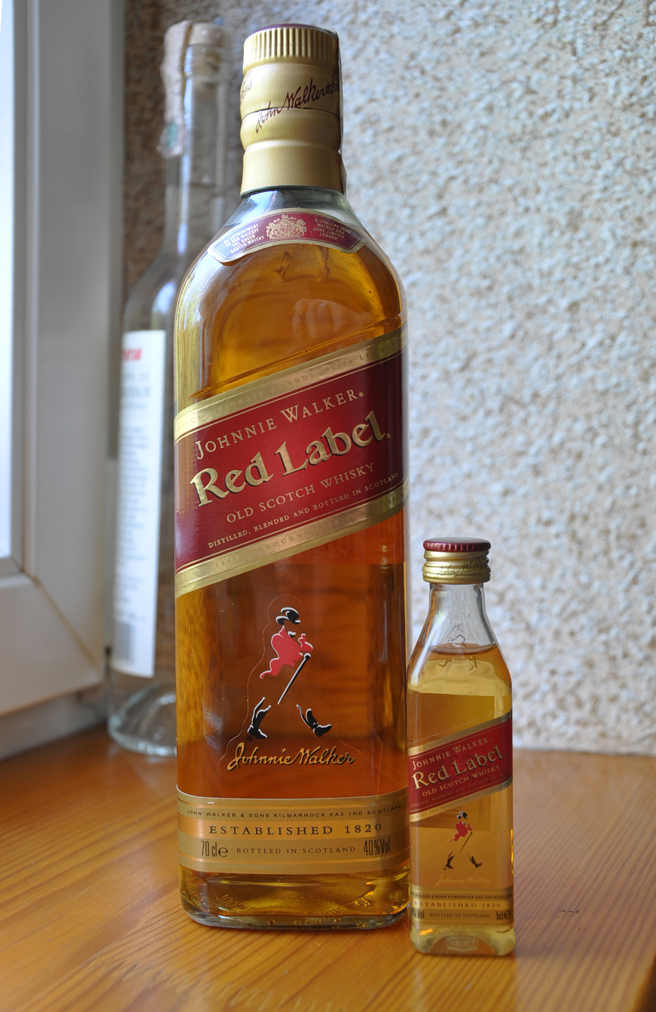 Johnnie Walker Red Label.